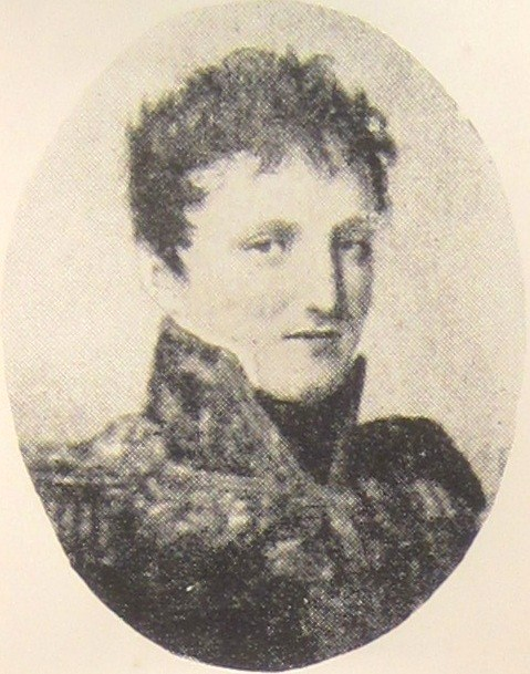 Description Jean-Baptiste Semellé Jean-Baptiste Semellé